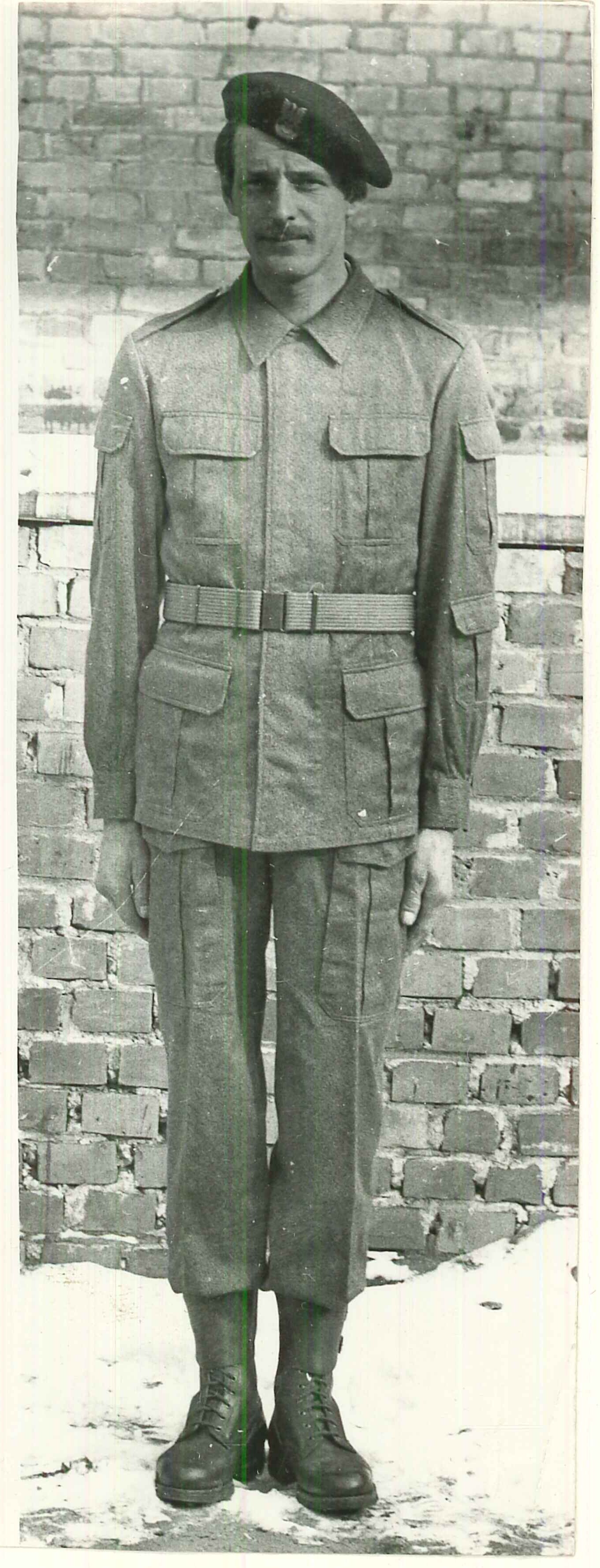 Mundur drelichowy dla wojsk powietrznodesantowych wz. 4643.